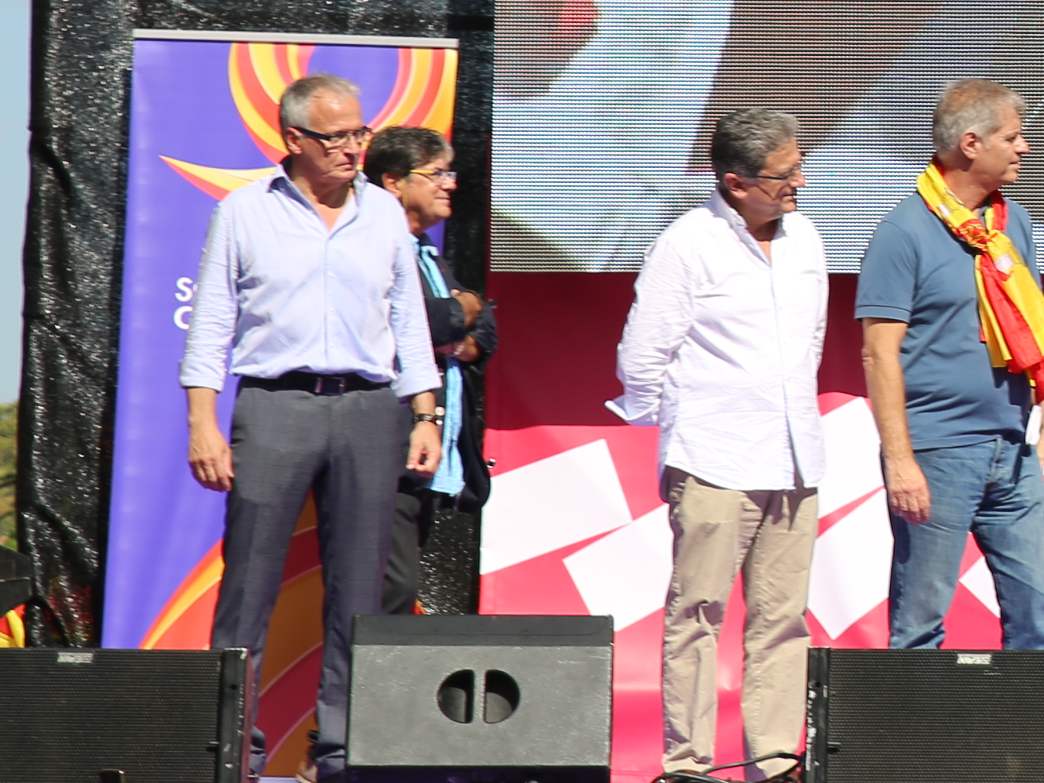 08.10.2017 Manifestació "Prou! Recuperem el seny" - Barcelona